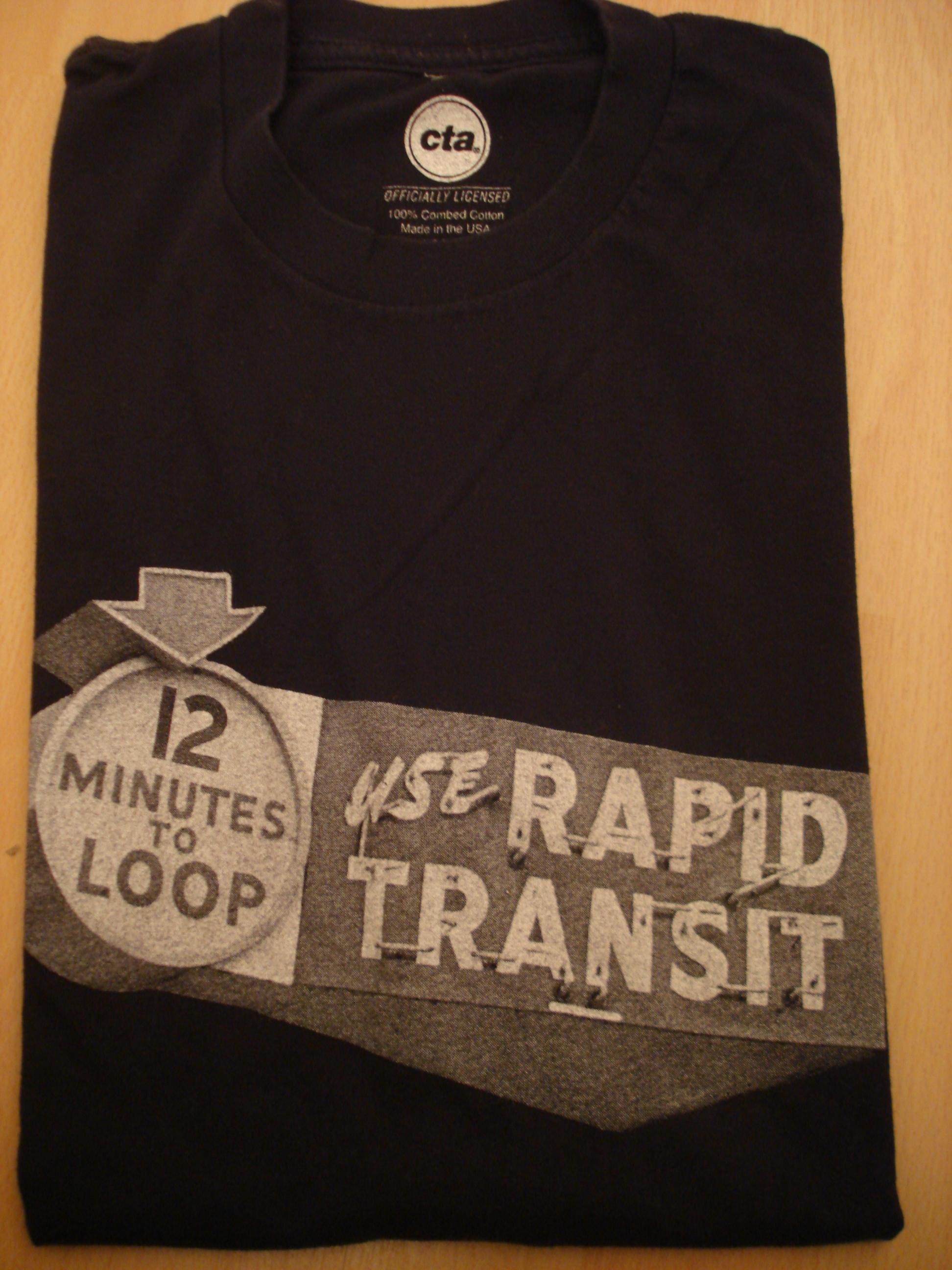 Photo d'un tshirt du CTA Gift avec l'ancien logo de Keeler Avenue